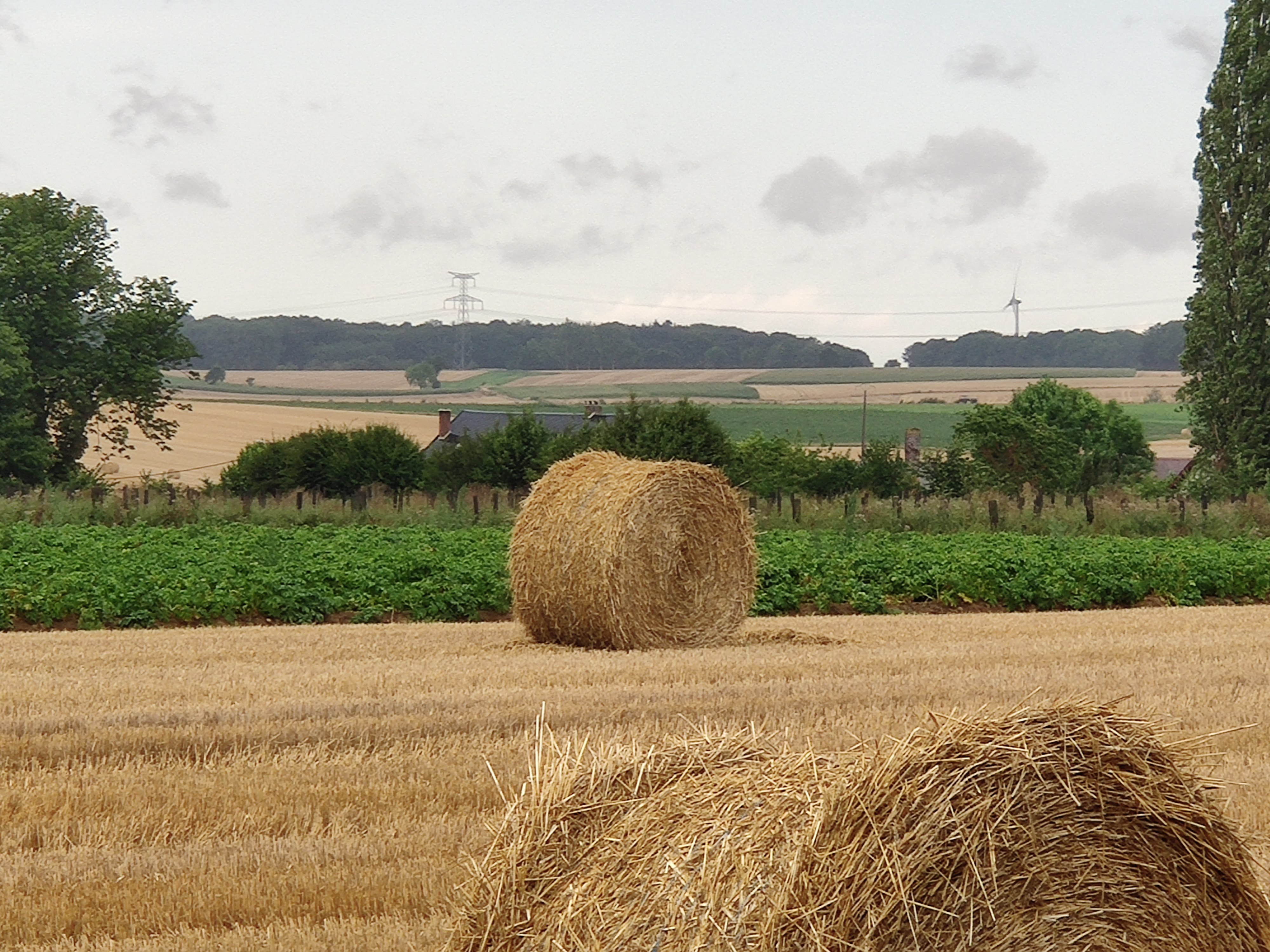 Mailly-Maillet : Paysage de moissons